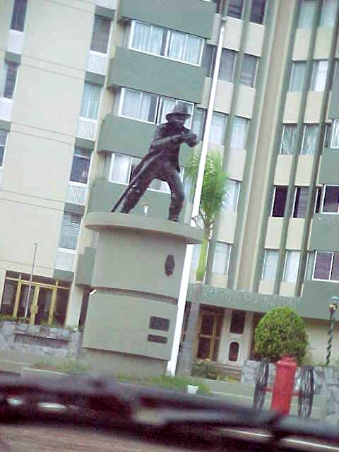 Estación de Bomberos El Cafetal en el municipio Baruta, Estado Miranda - Venezuela (2000)